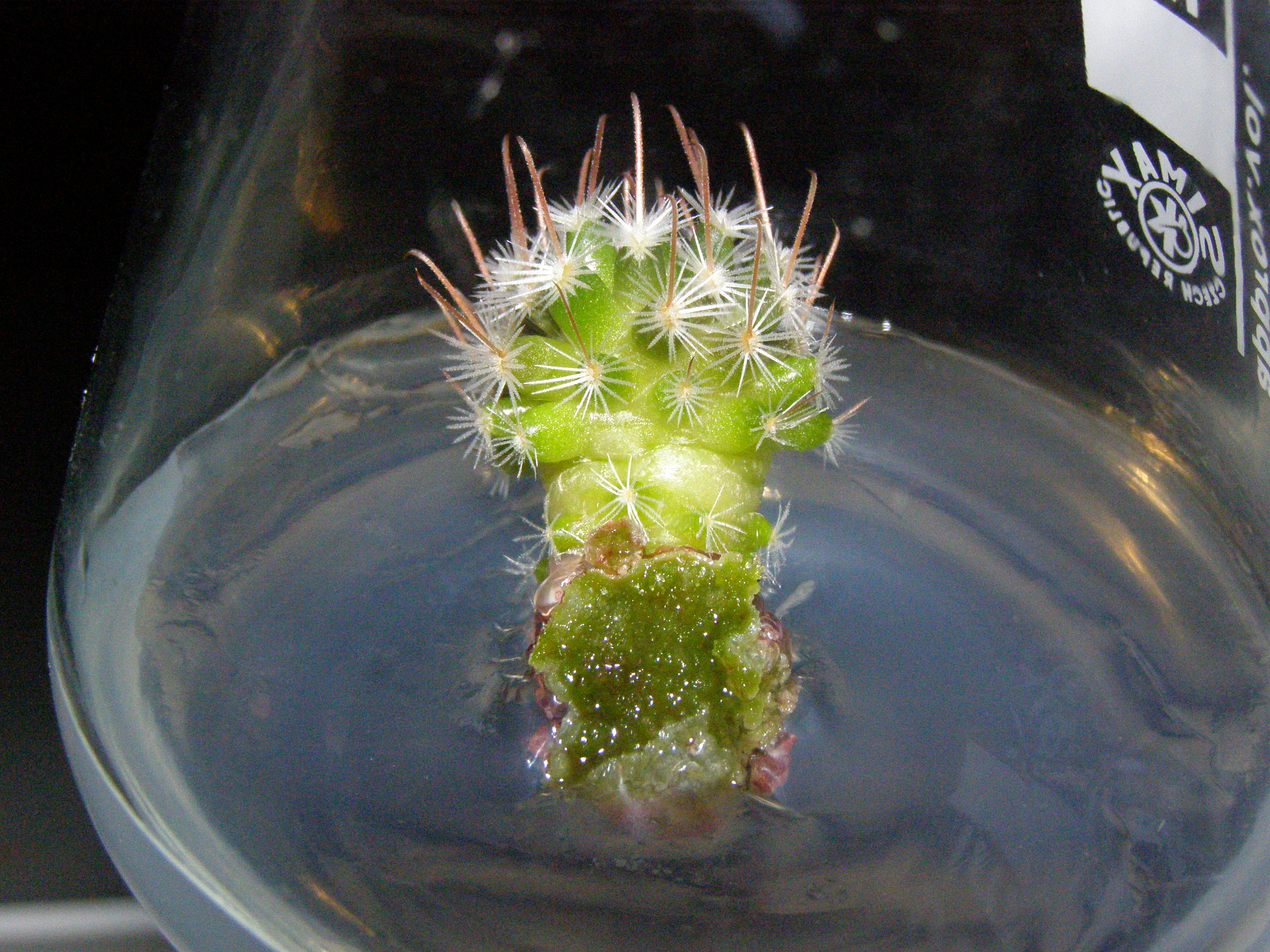 Mammillaria sp. na MS mediu. Praha, Česká republika.